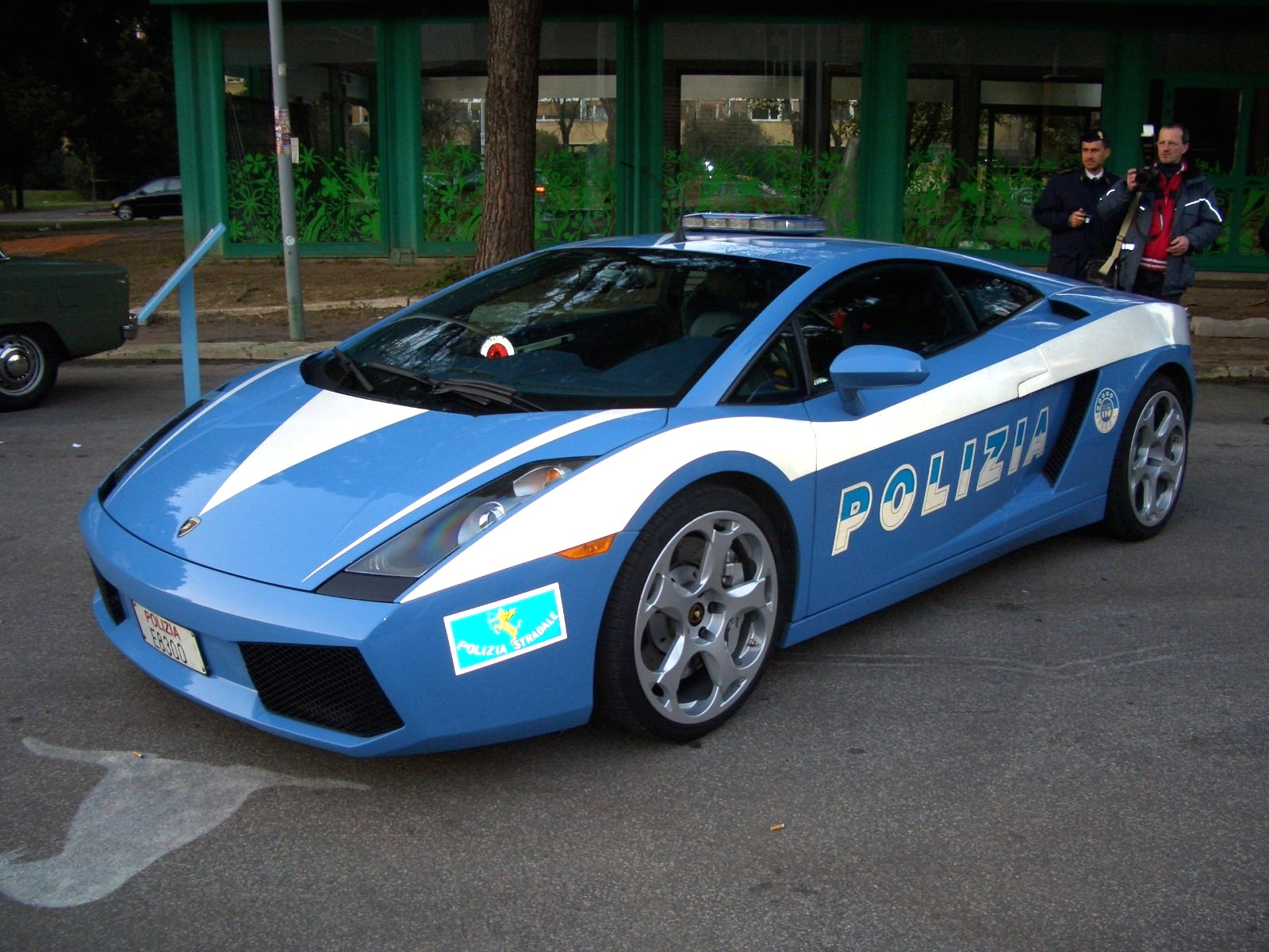 Lamborghini Gallardo in uso presso la Polizia di Stato Italiana